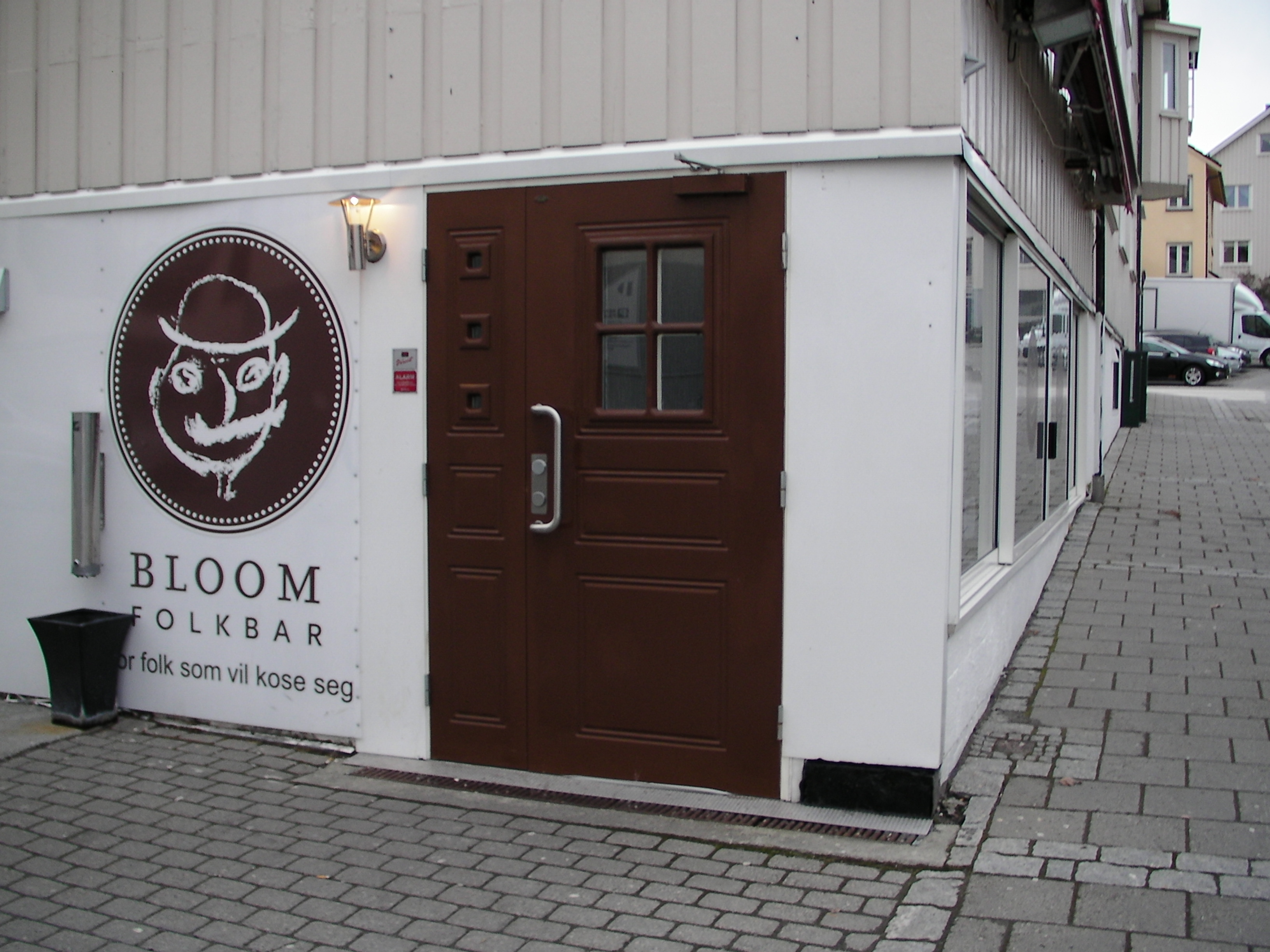 Bloomfolkbar Bodø